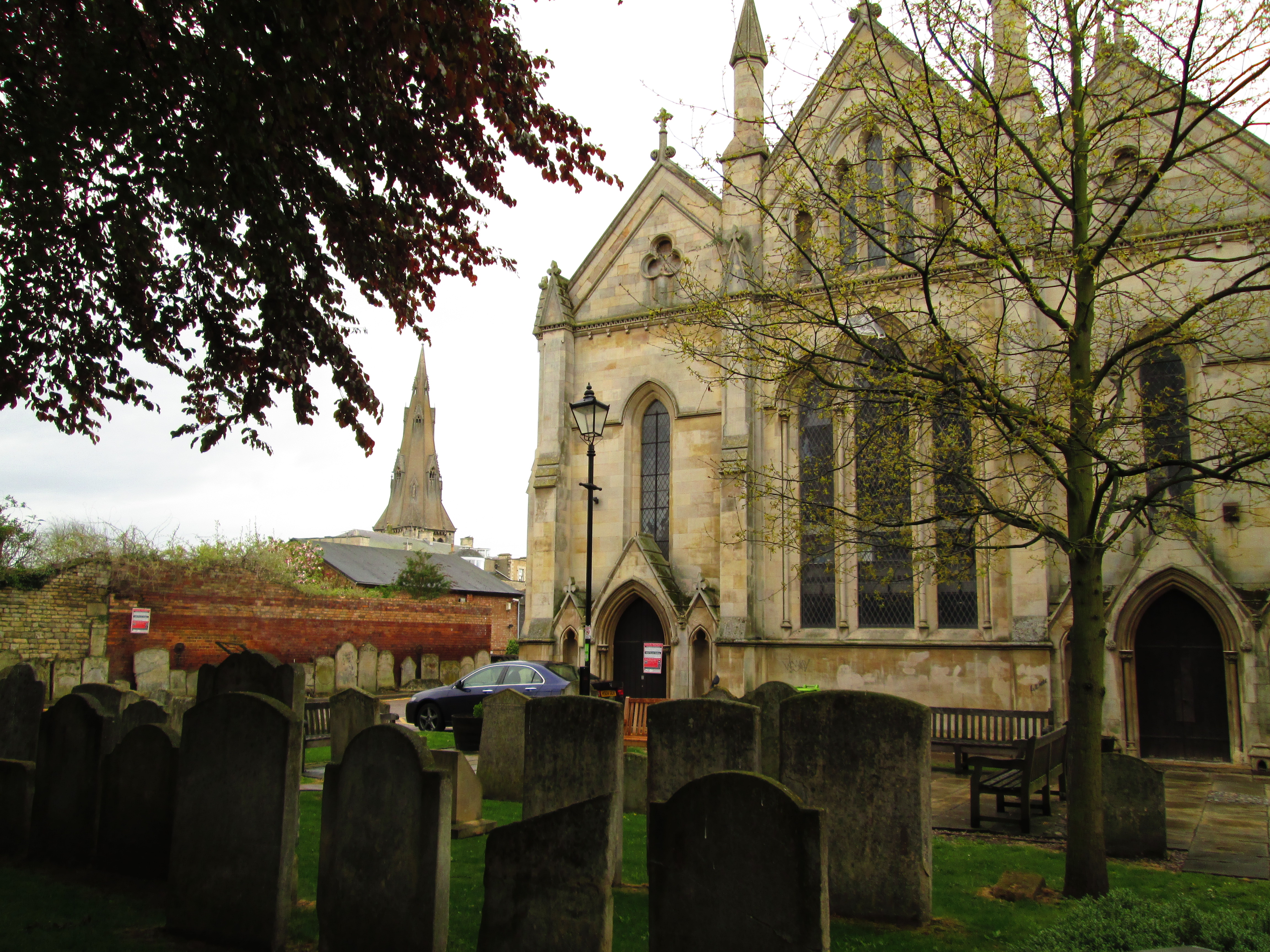 Stamford PE9, UK